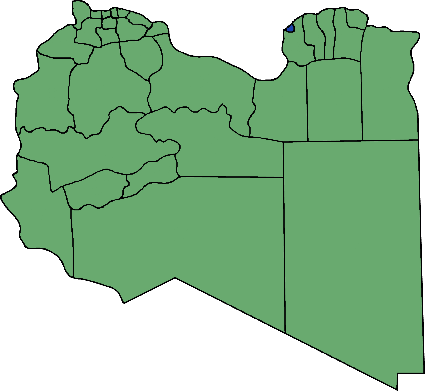 Die neuen Gemeinden (Munizipien) in Libyen. Benghazi hervorgehoben.